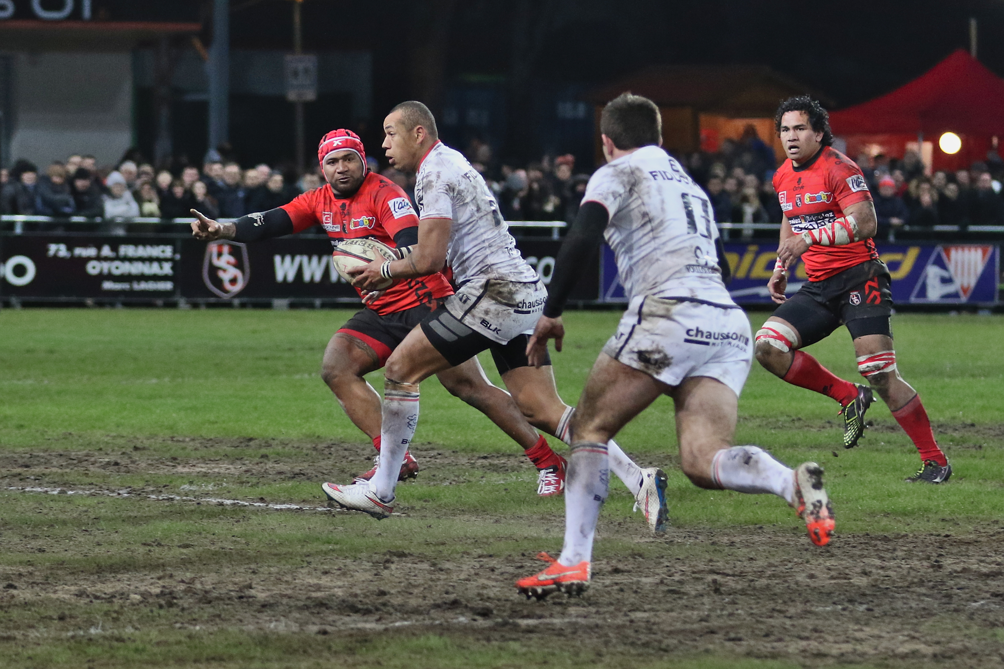 USO-ST - 20150306 - Gael Fickou à l'attaque